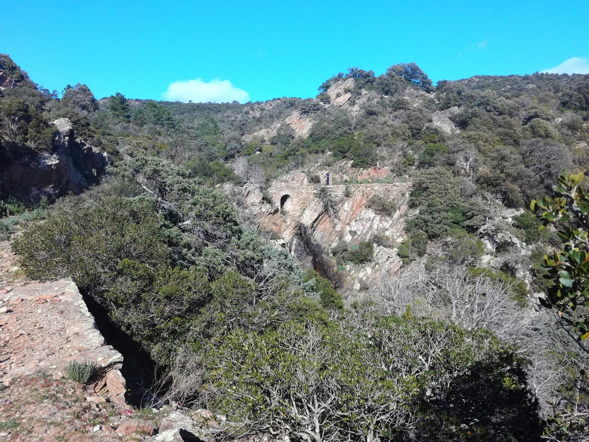 Le Vallon de la Gourre, Massif de Maures, Var, France, commune de Borme-les-mimosas.